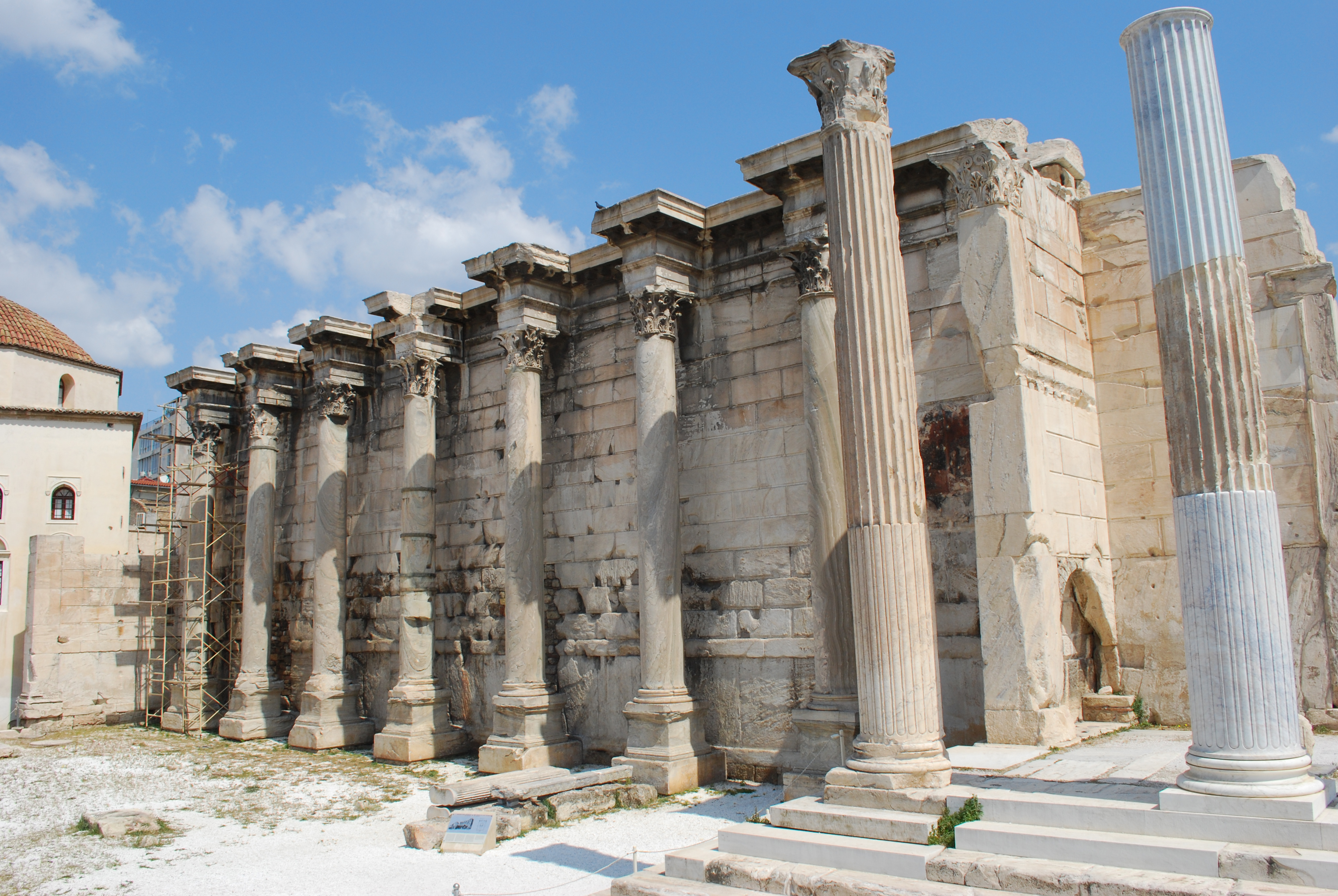 Athènes : la Bibliothèque d'Hadrien.